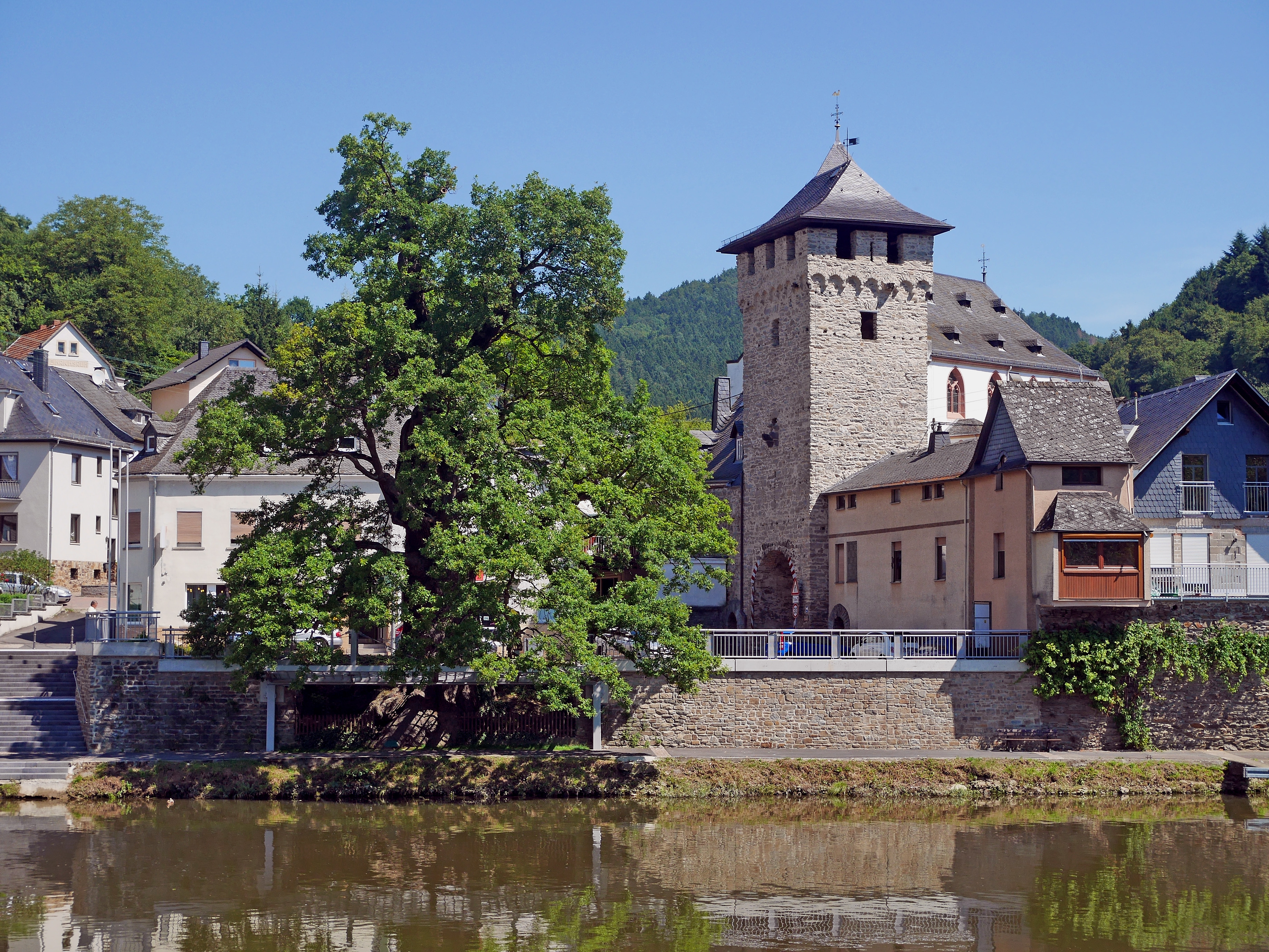 Die Toreiche, auch Alte Eiche, Tausendjährige Eiche oder Gerichtseiche genannt, steht am Ortseingang von Dausenau, vor dem Torturm der ehemaligen Stadtbefestigung, in Rheinland-Pfalz am Ufer der Lahn. Mit über 8 m Stammumfang zählt sie zu den größten Eichen in Deutschland.